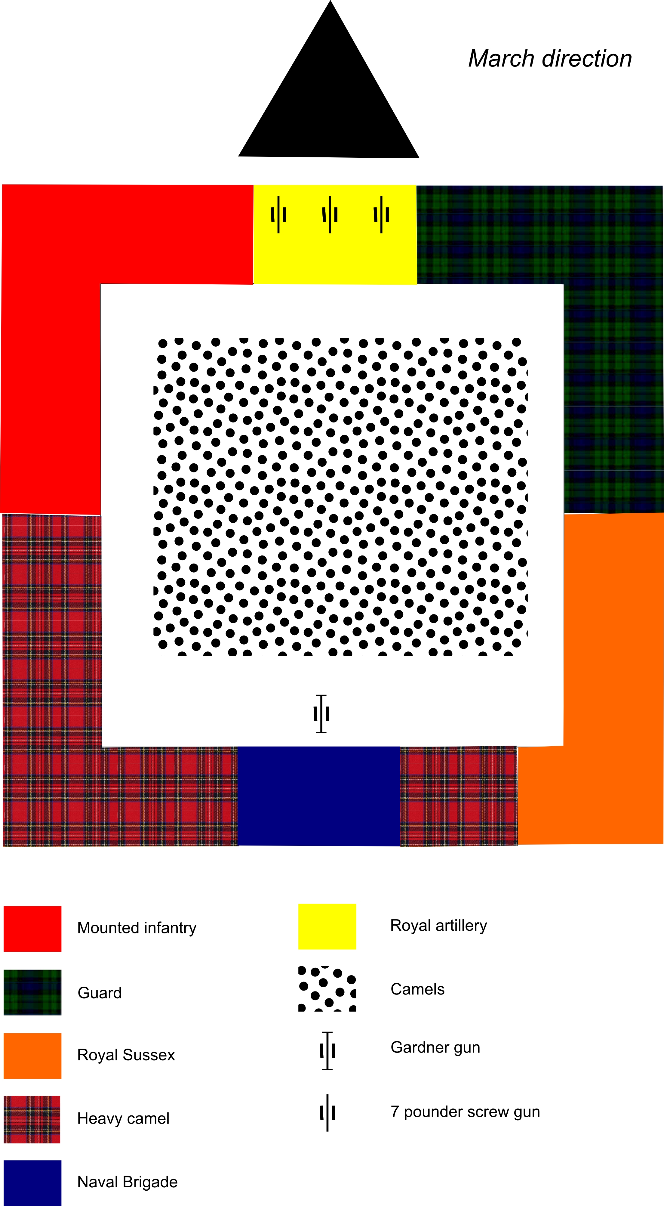 Klaudio, file creato in proprio. Organizzazione dei Regiments nel quadrato di Abu Klea Fonti Pictorial records of the Englih in Egypt with a full and descriptive life of General Gordon the hero of Kartoum, James Sangster & Company, London (mancano indicazioni dell'autore e della data di pubblicazione) Abu Klea battle URL consultato in data 15/01/2013 Il file rappresenta l'organizzazione del quadrato costituito dalla Colonna del deserto nella battaglia dei pozzi di Abu Klea (17 gennaio 1885), Sudan. Klaudio, author. Regiments organization in the Abu Klea battle Saquare File presents the square organization of the Desert Column inthe Abu Klea wells battle (17 January 1885), Sudan.